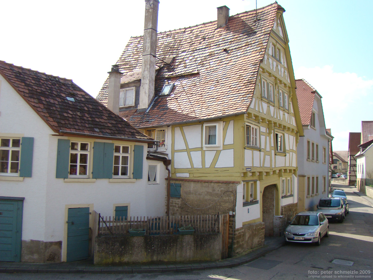 Historisches Gebäude Leiergasse 9 in Eppingen